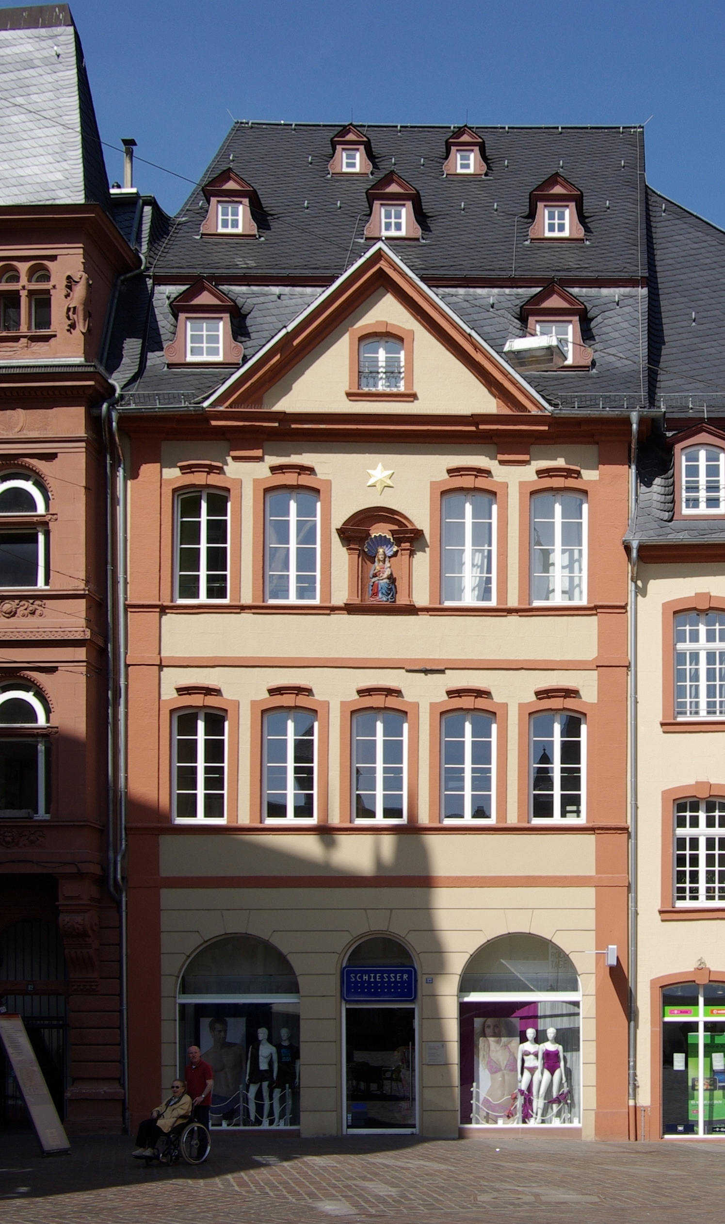 Trier, Fleischstraße 83: ehemaliges Zunfthaus der „Geschenkten“; dreigeschossiger barocker Mansarddachbau, um 1737, Architekt wohl Joseph Walter, über kreuzgratgewölbtem gotischem Keller; südwestlich des Vorderhauses kleiner gotischer Einstützenkeller